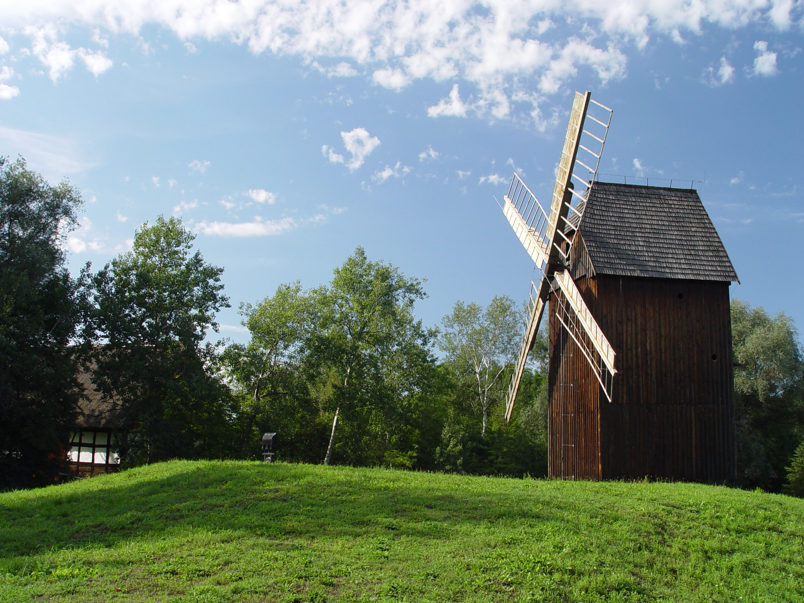 Wiatrak w Muzeum Wsi Opolskiej w Opolu